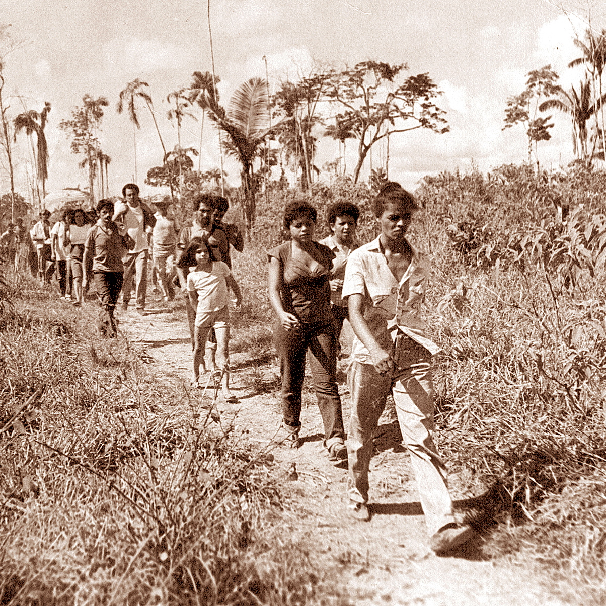 Empate Bourdon-Xapuri (1986)